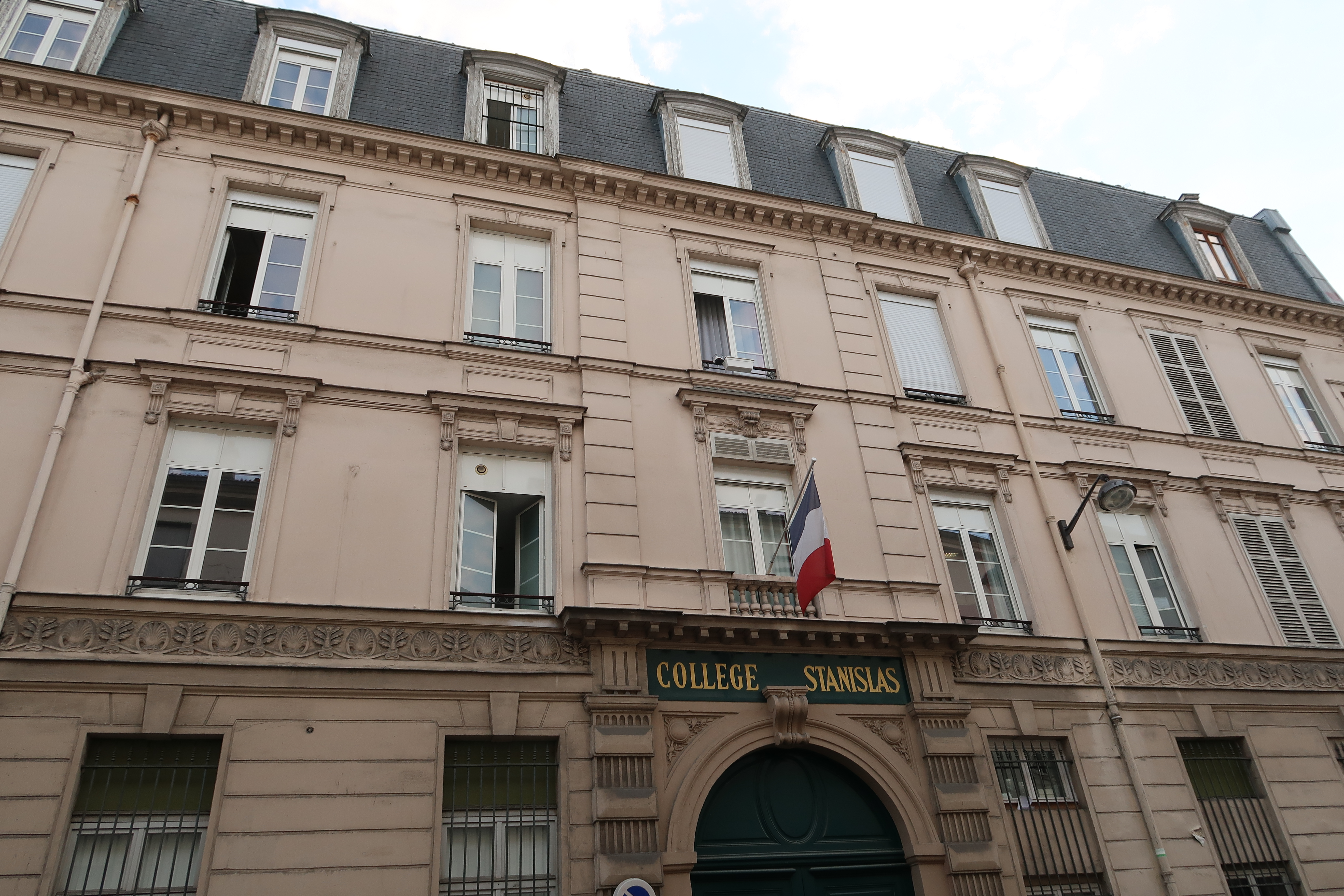 Collège Stanislas, rue Notre-Dame-des-Champs (Paris 6e).